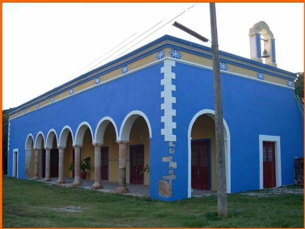 casa de rayas hacienda San José Chactún